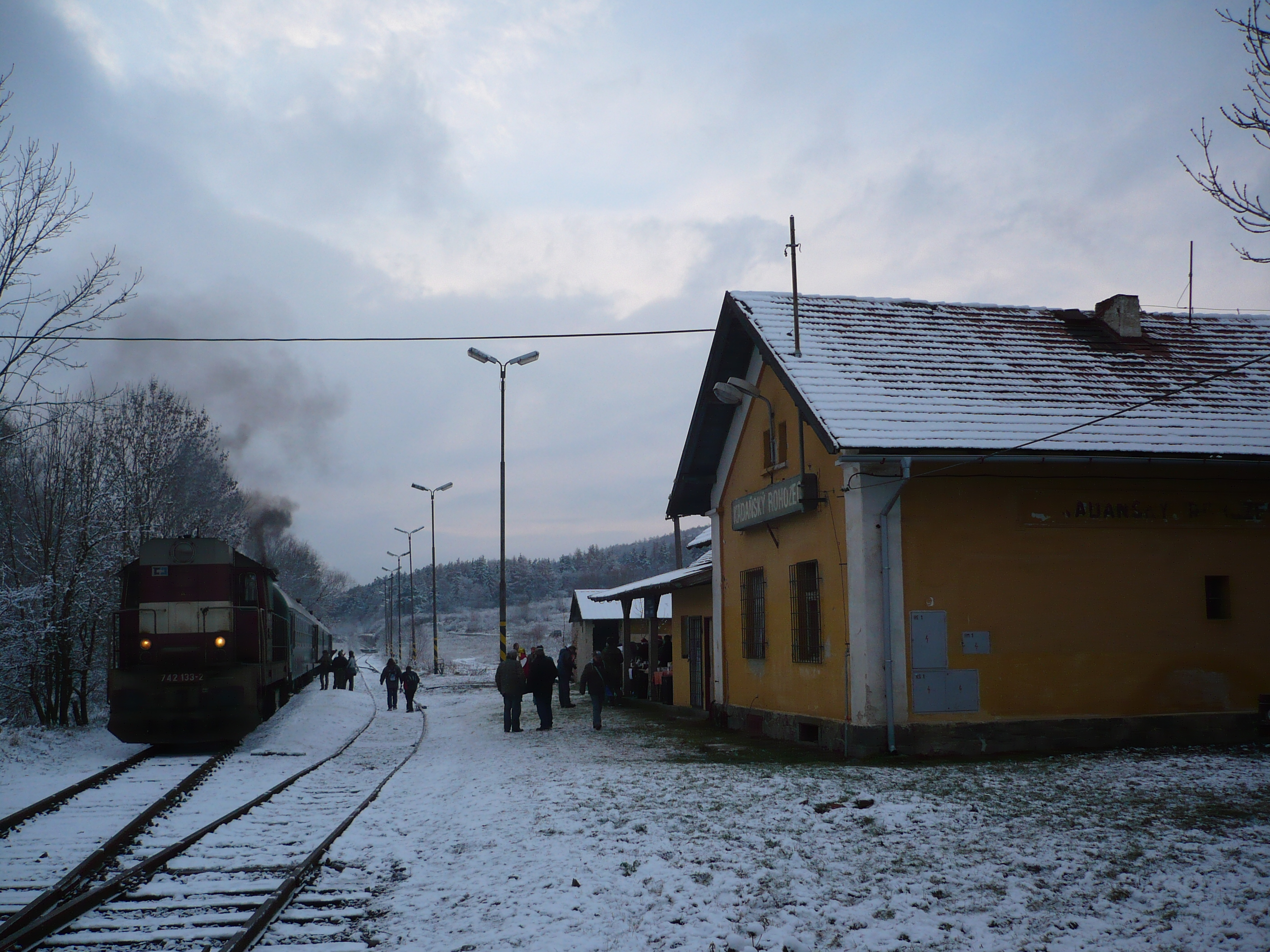 Mikulášský vlak v Kadaňském Rohozci. Vlastníkem budovy je státní organizace Správa železniční dopravní cesty (Radonice-Kadaňský Rohozec, parcela "st. 39")